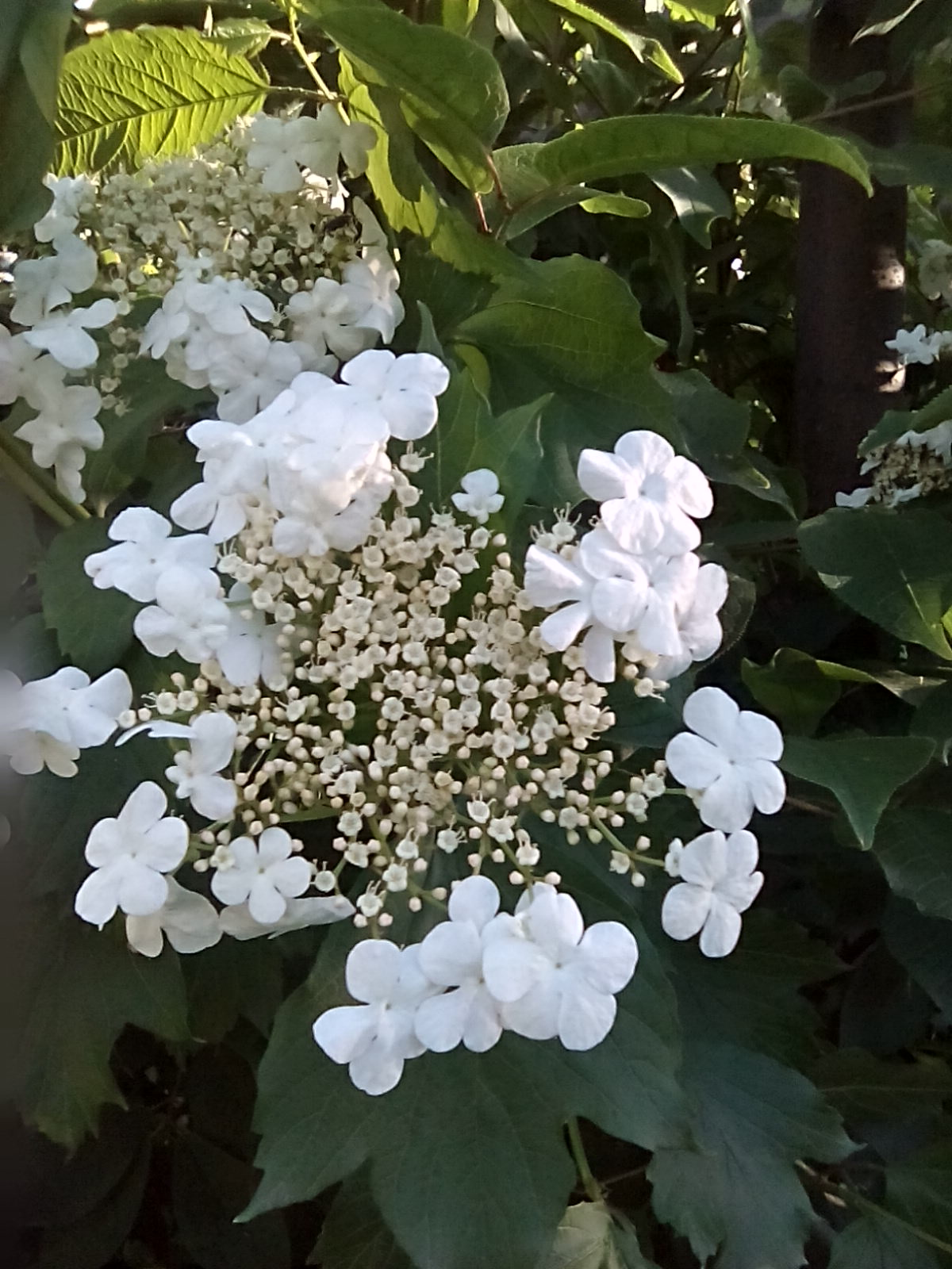 Ой, цветет калина...